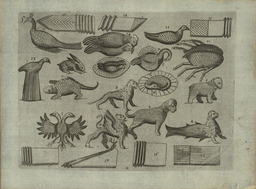 Animali piegati con “spina pesce” (in Trattato delle piegature di Mattia Giegher, 1629, tav. 5)